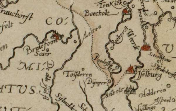 fragment van de kaart van Gelriae in de Ortelius atlas